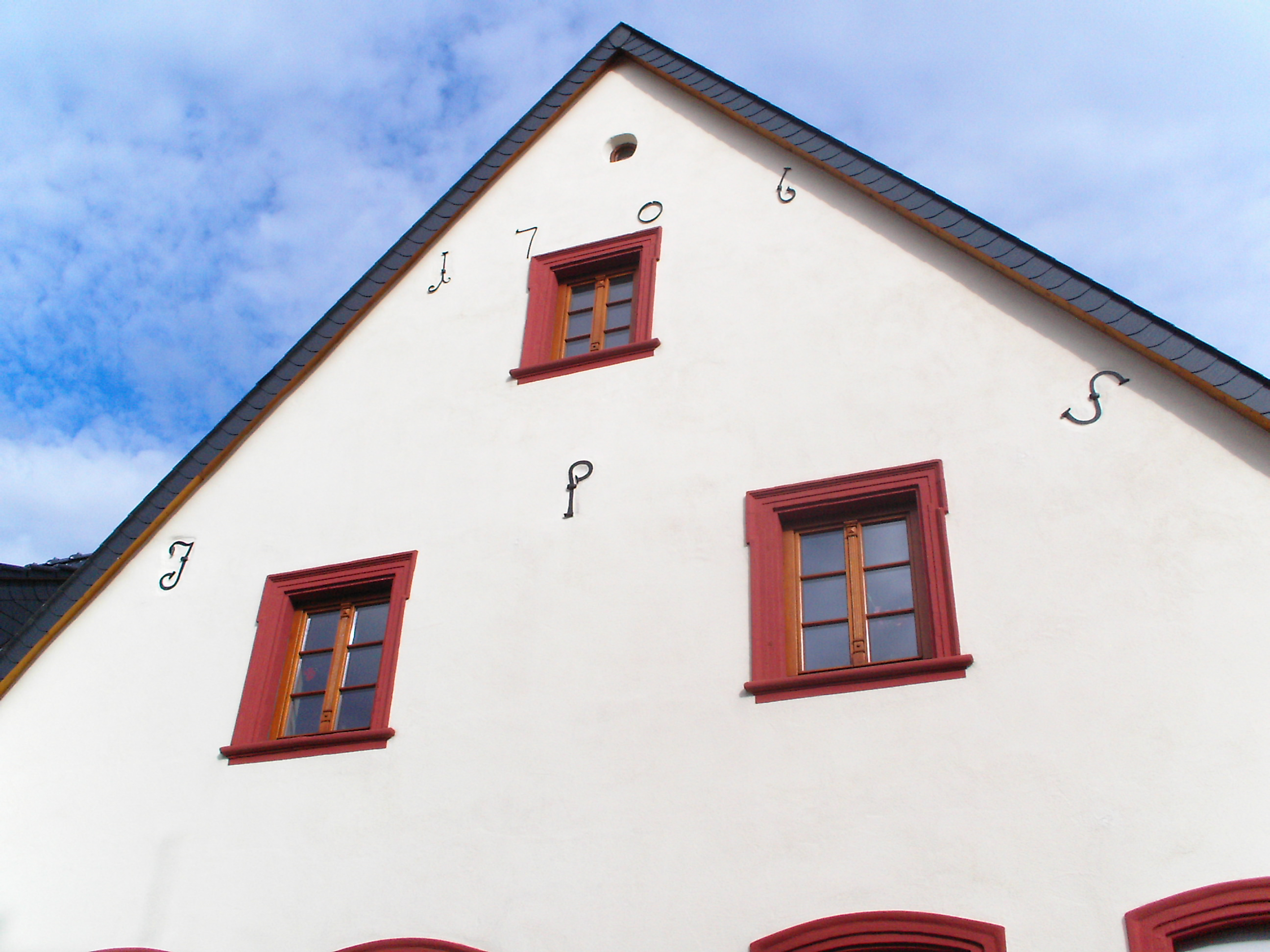 Grünstadt, Haus mit Initialen von Schultheiß Schwarz